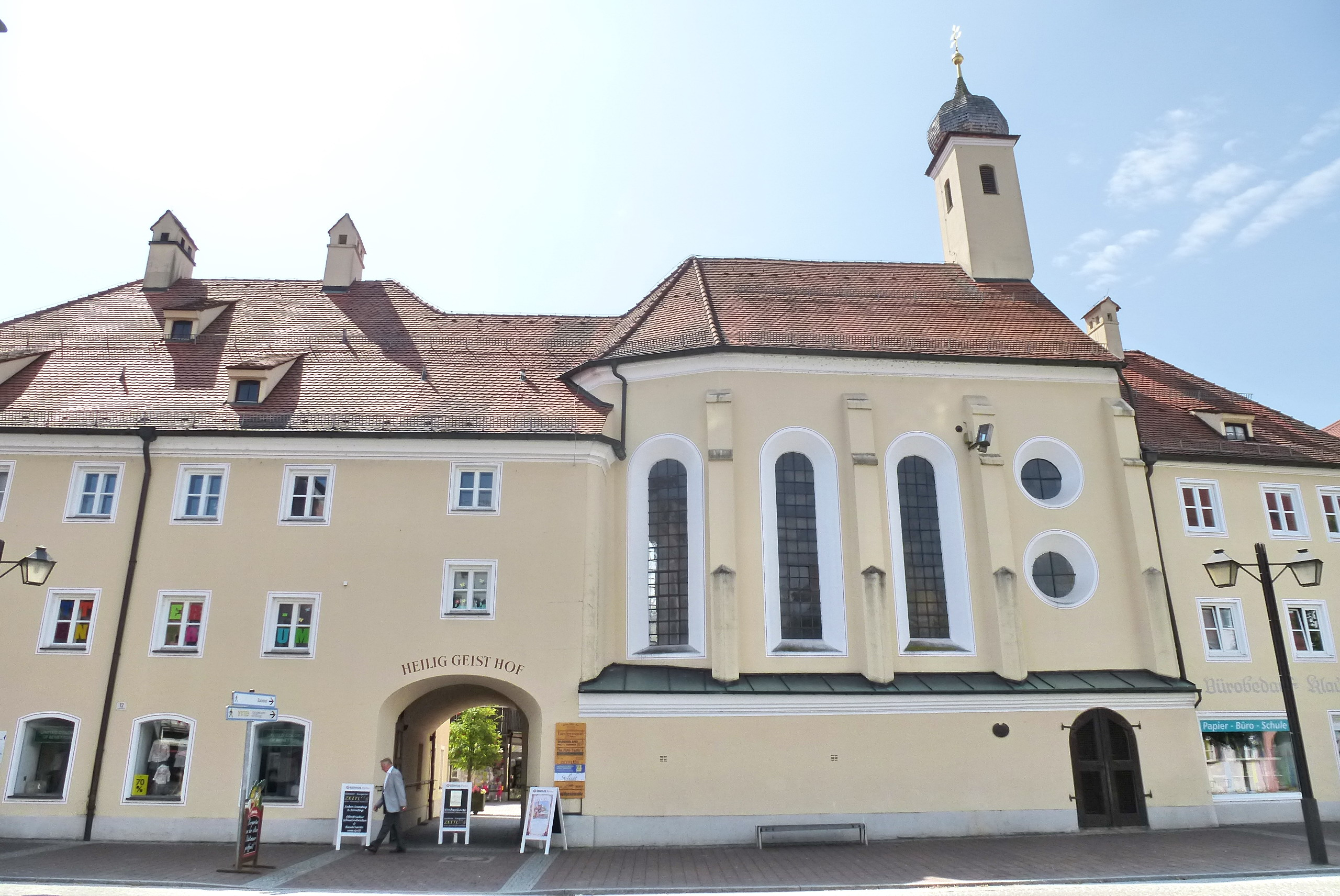 Erding, Spitalkirche Hl. Geist